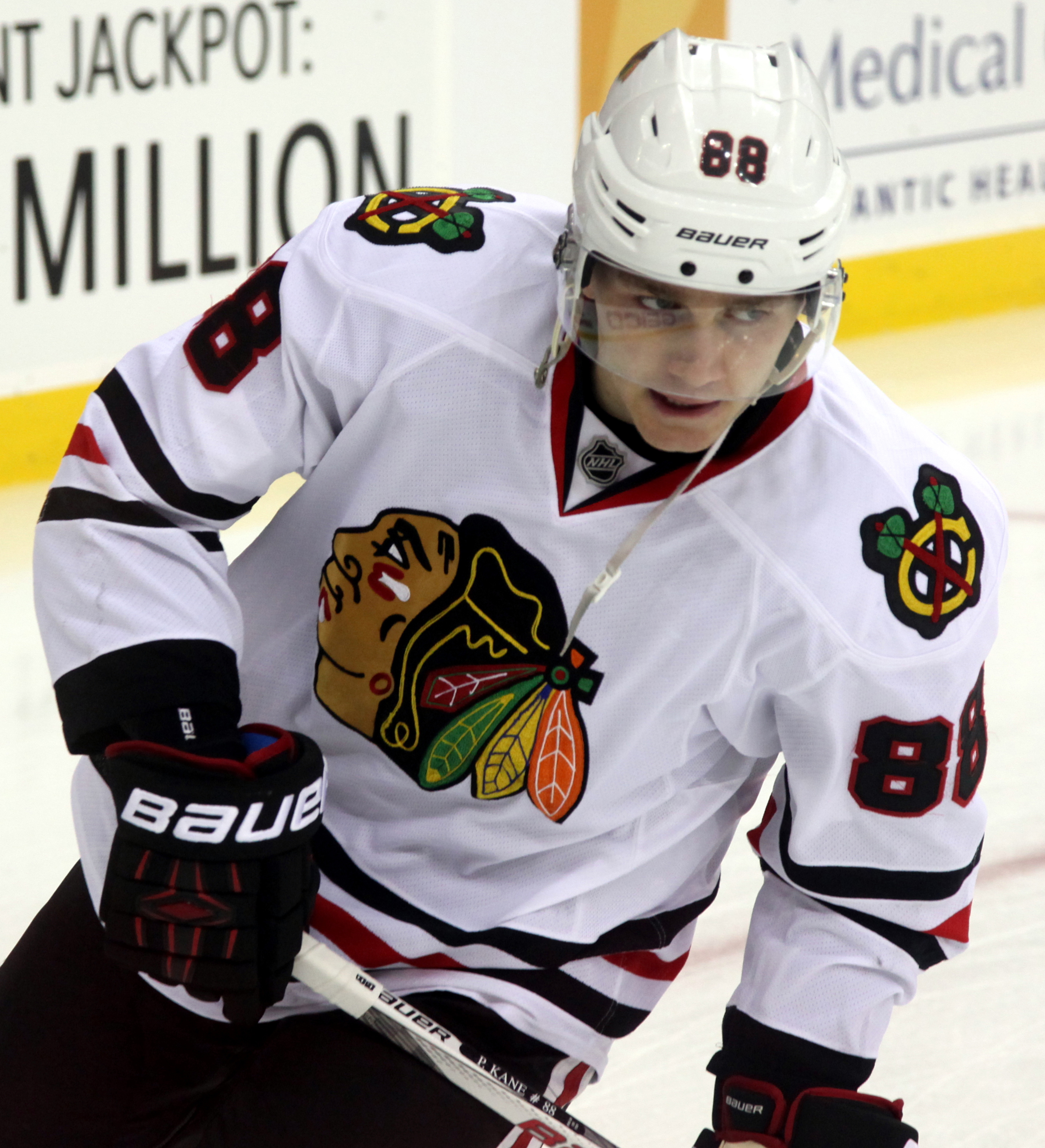 Patrick Kane in December 2014.